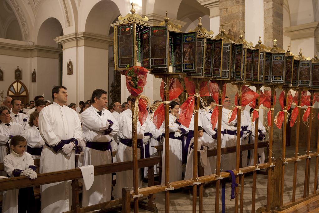 Acto del voto del silencio, previo a la procesión del Silencio, en la Semana Santa de Astorga (León, España).